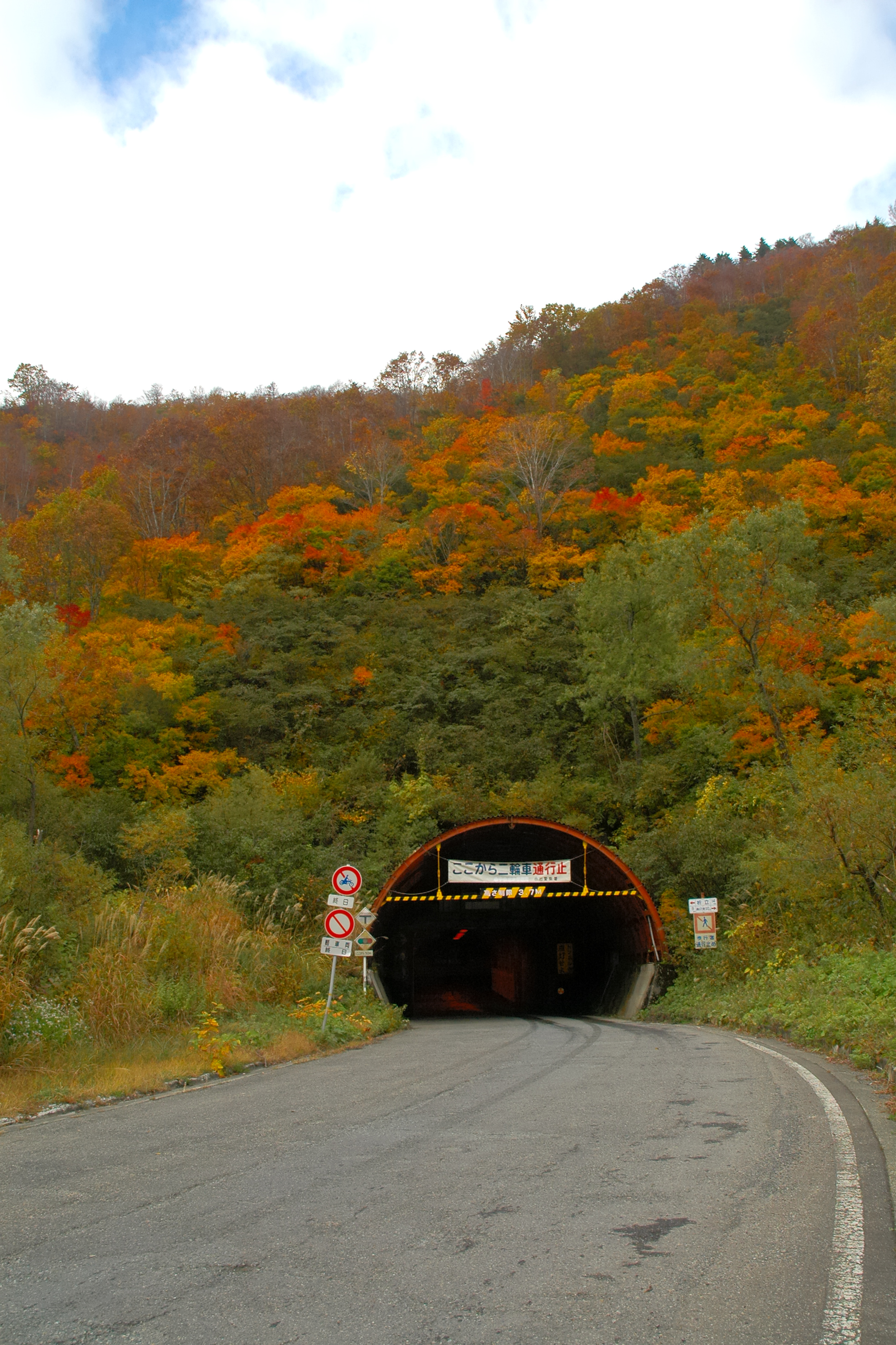 Niigata prefectural road route 50 Okutadami Silver Line (新潟県道50号小出奥只見線奥只見シルバーライン銀山平出入口)